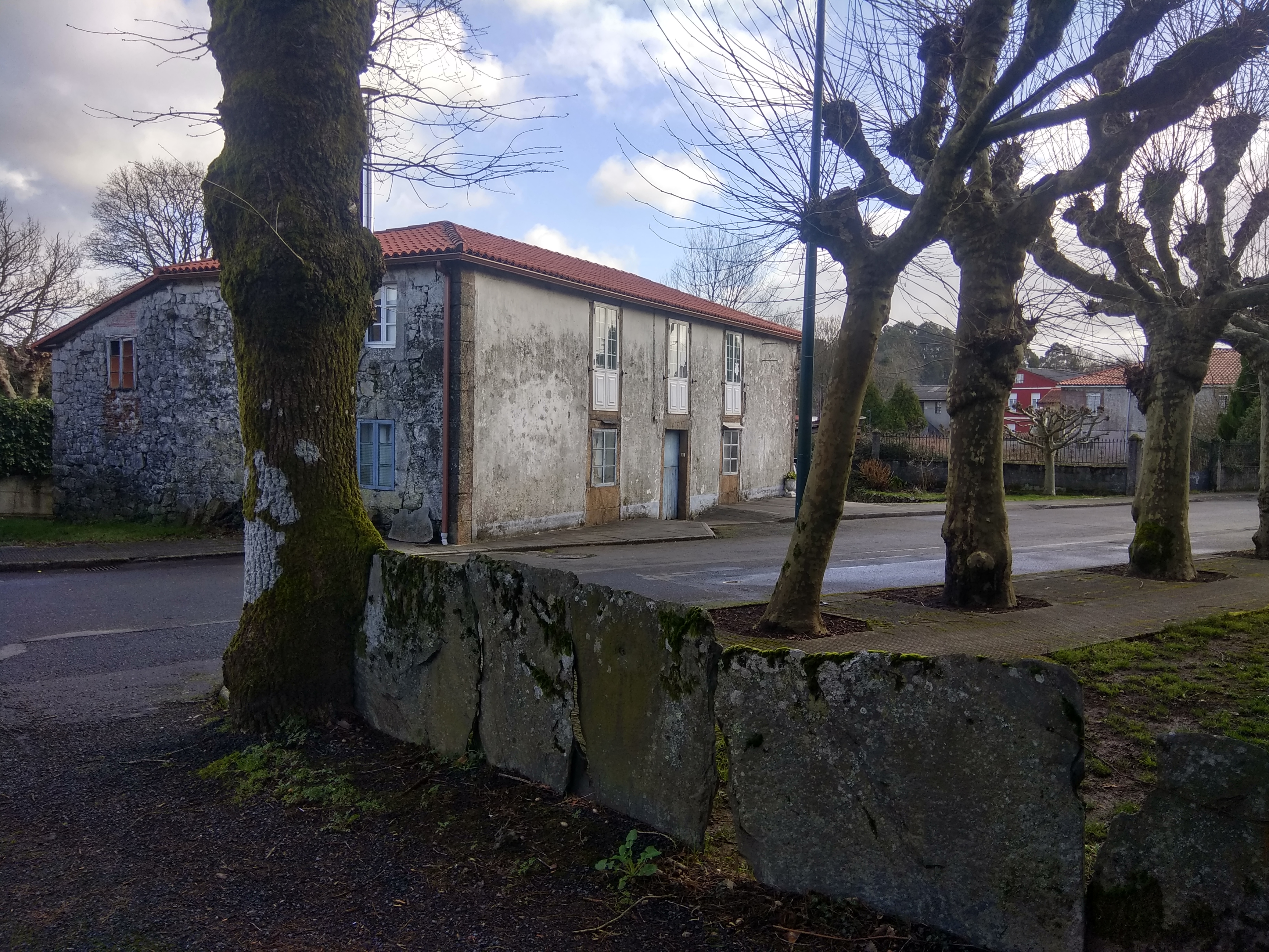 Casa de Antón de Pepiño en Teixeiro, Curtis, Galiza.